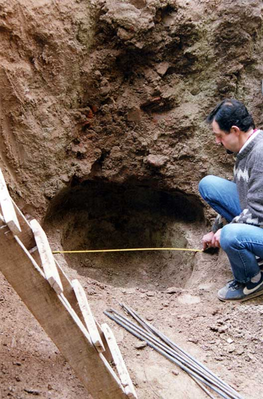 Excavaciones arqueológicas en el ámbito de la ciudad de Buenos Aires.